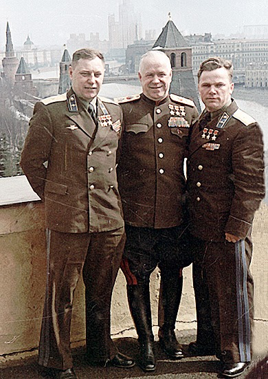 Трижды Герои Советского Союза Маршал Советского Союза Г.К. Жуков (в центре), генерал-майоры авиации А.И. Покрышкин (слева) и И.Н. Кожедуб (справа) на территории Кремля в дни работы сессии Верховного Совета СССР. Москва, ноябрь 1957 г.